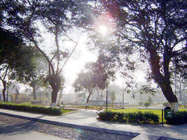 Parque Central de Chaclacayo Fuente: Nestor Ulaf Salcedo Zuta. Colección personal. Junio 2006